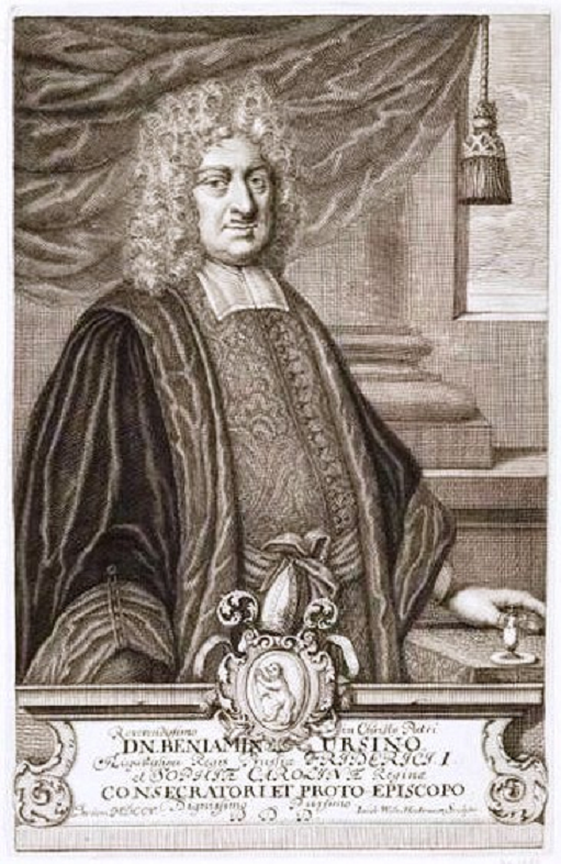 Benjamin Ursinus (von Baer), (* 1646; † 1720), kurbrandenburgischer Oberhofprediger und nachmaliger Bischof der reformierten Kirche in Preußen, mit Stammwappen der Familie Ursinus: ein Bär, aufgerichtet sich gegen einen schrägen Baumstamm am vorderen Schildrand stemmend. Der ovale Schild in einer Rankenwerk-Kartusche bekrönt von einer Bischofsmitra und vor zwei gekreuzten Bischofsstäben.